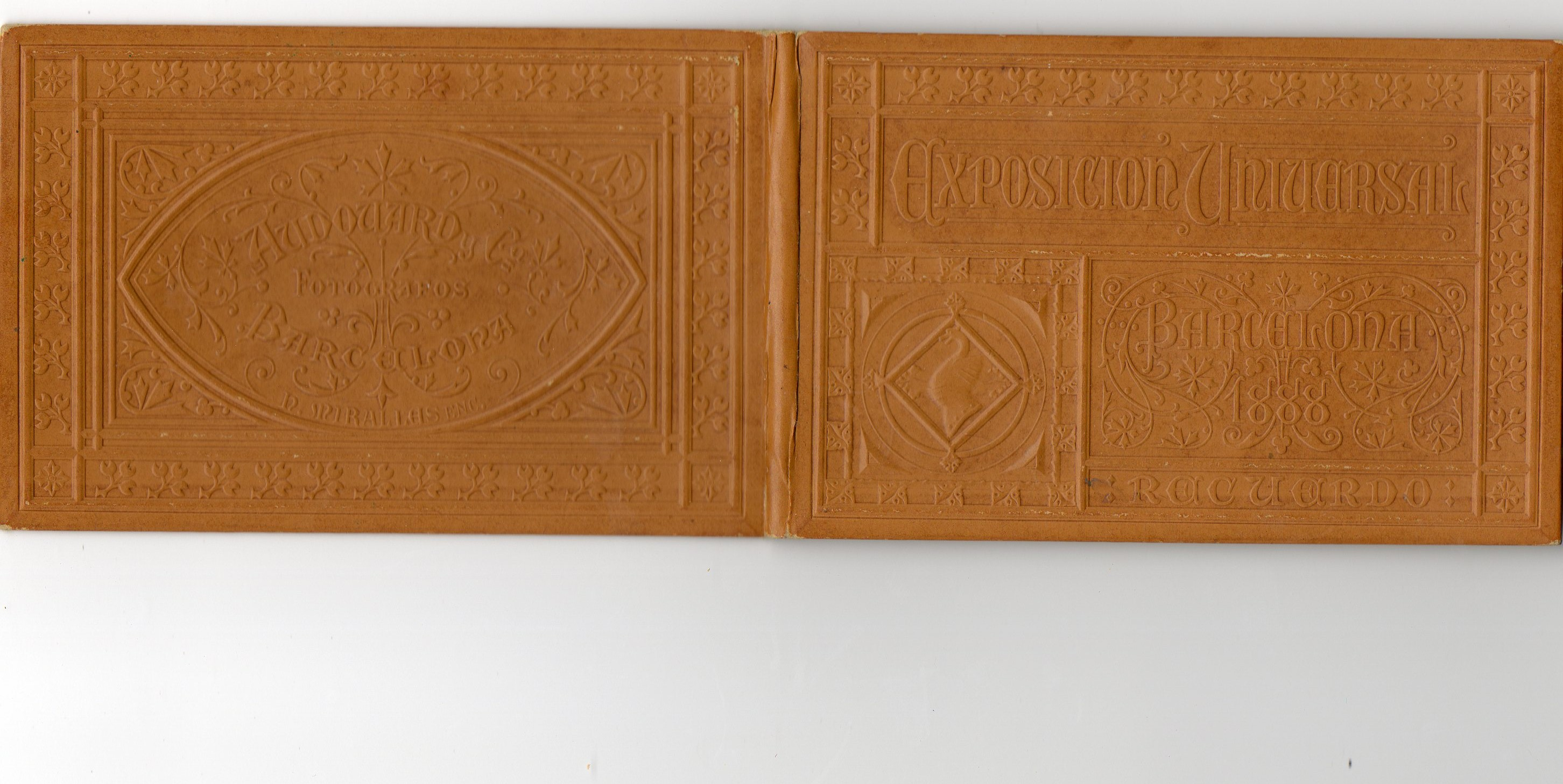 Colección de fotografías del S. XIX